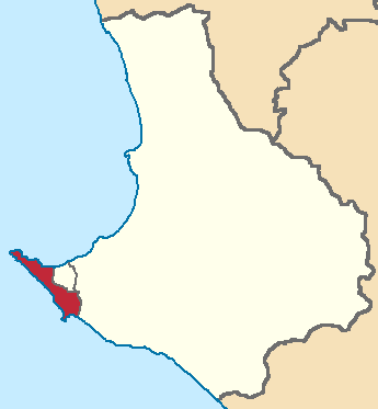 Mapa localizador del cantón en Santa Elena, Ecuador